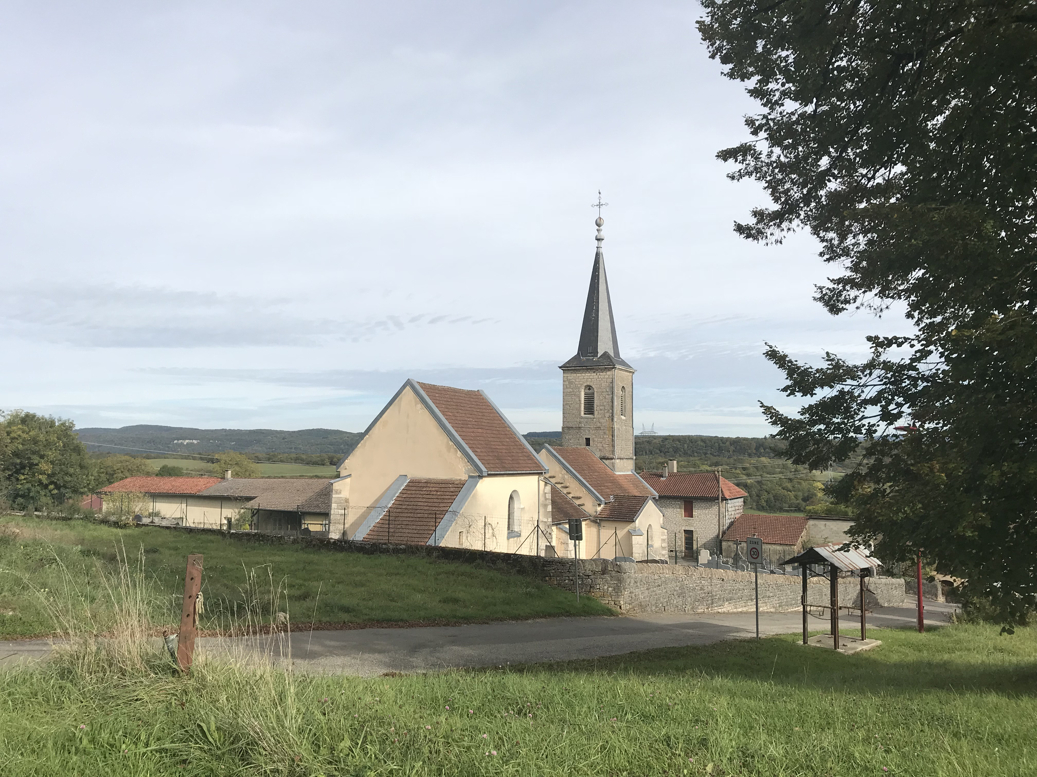 Vue du village de Véria (Jura, France) en octobre 2017.